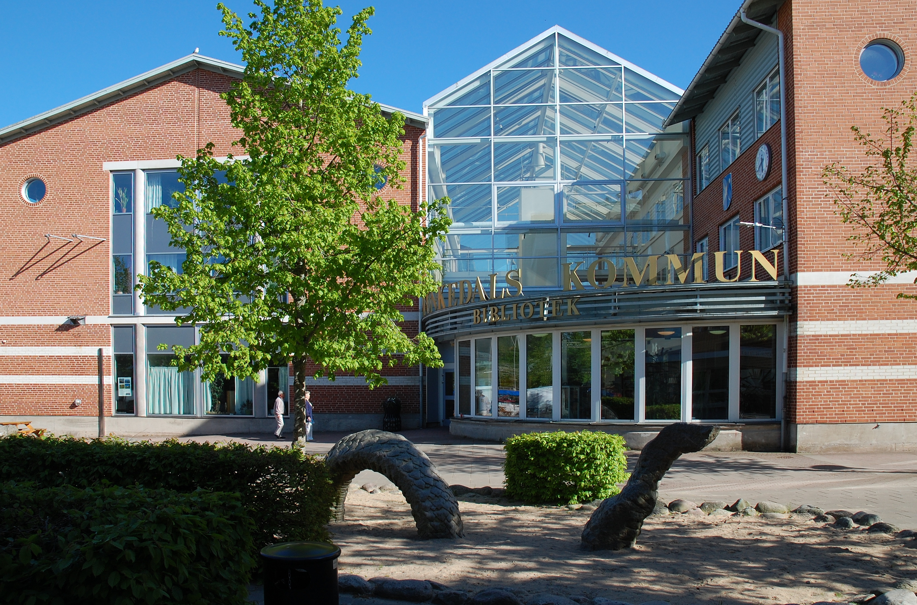 Munkedals kommunhus.